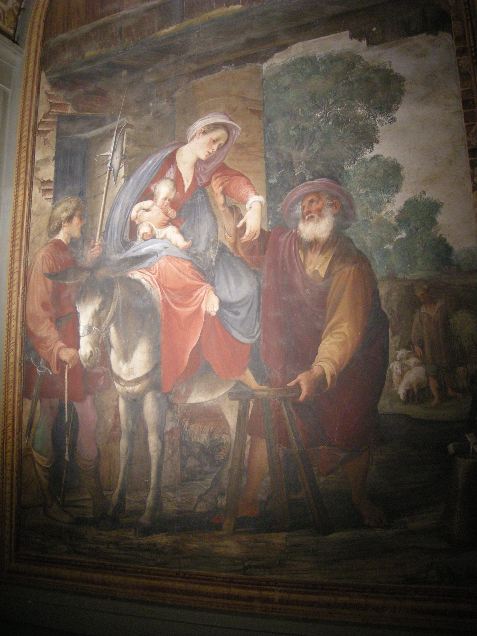 Accademia di firenze, cappella di giovanni da san giovanni 01